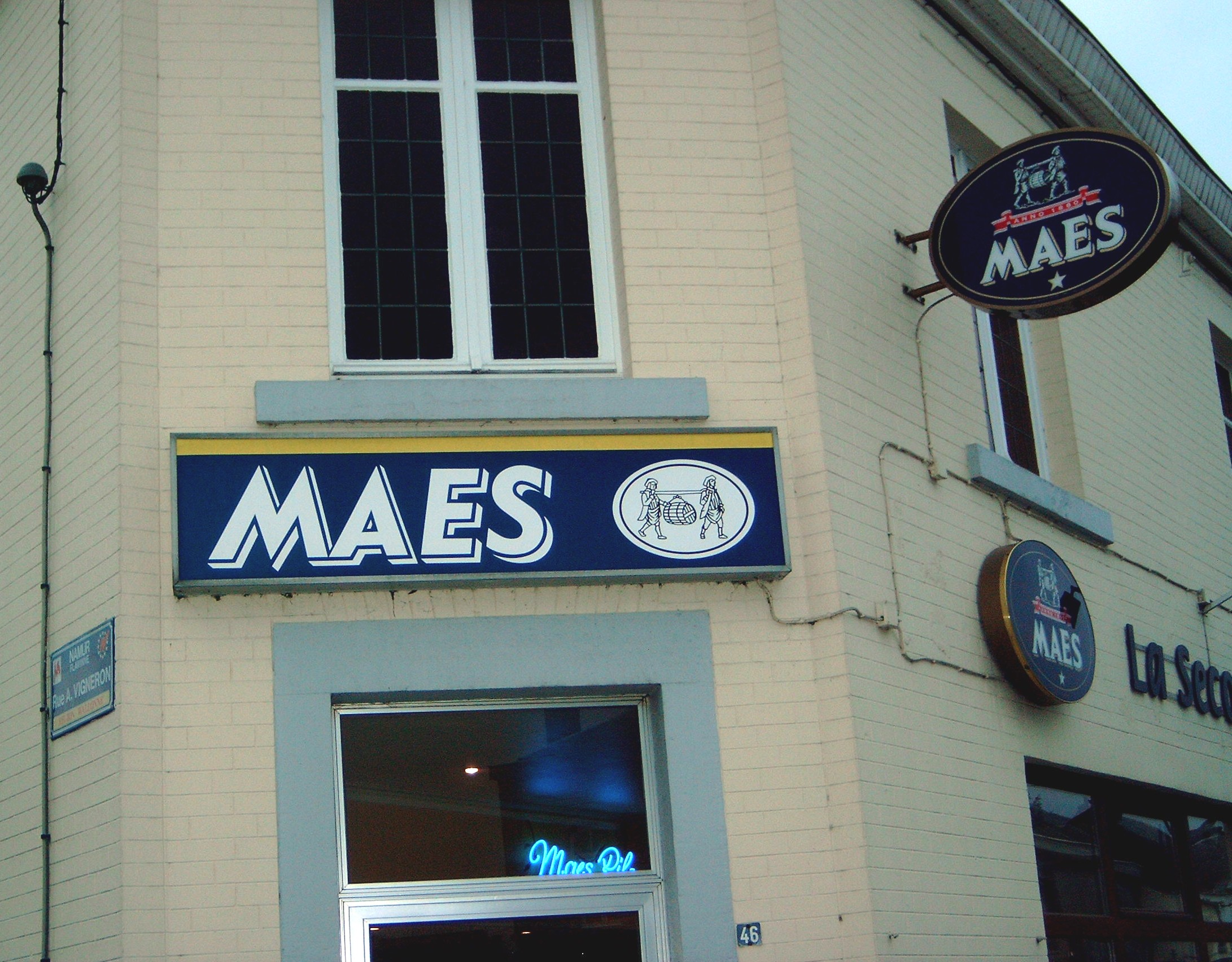 Een cafe met Maes-bier te Flawinne (België). Eigen opname van 11 feb. 2006.